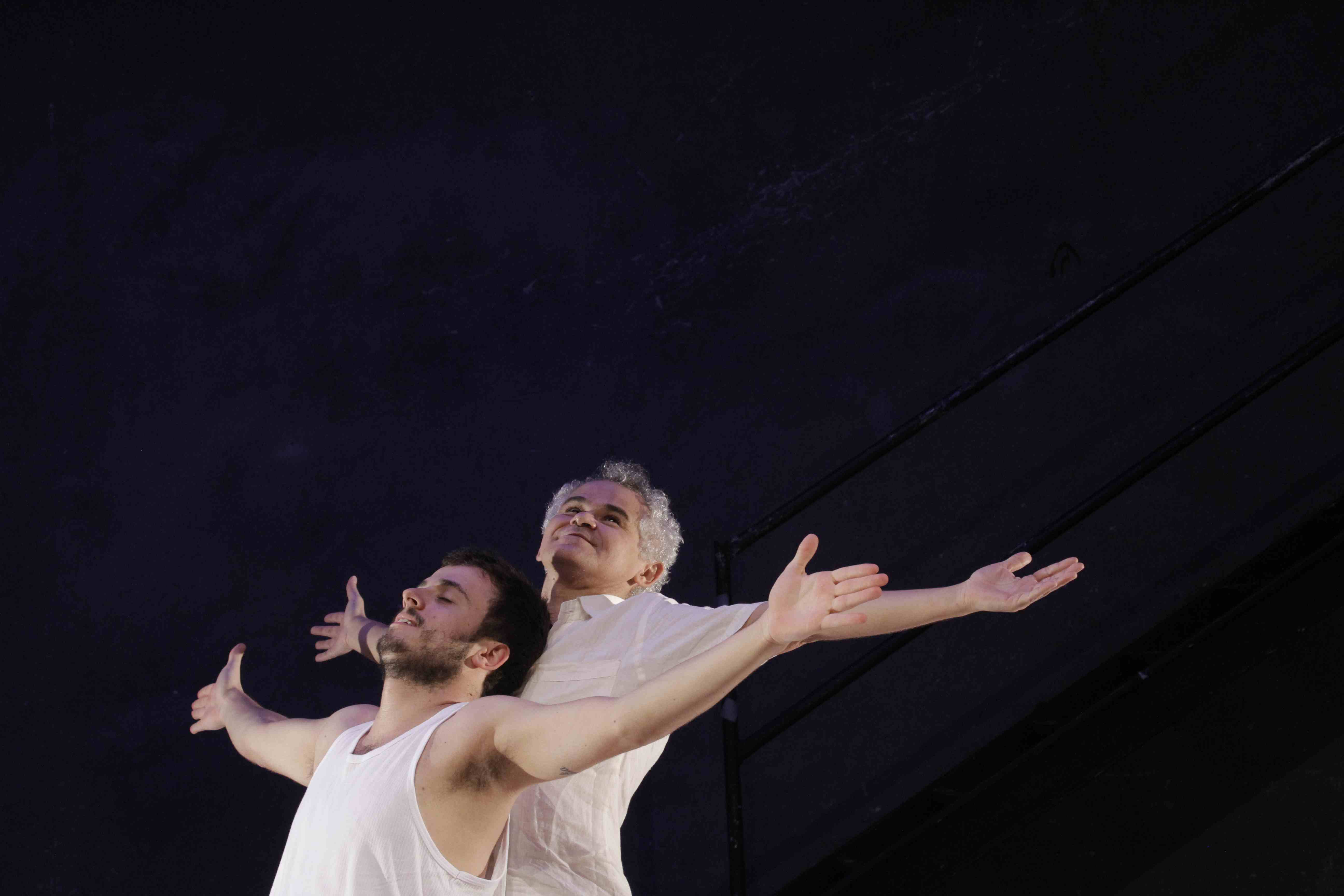 Peça